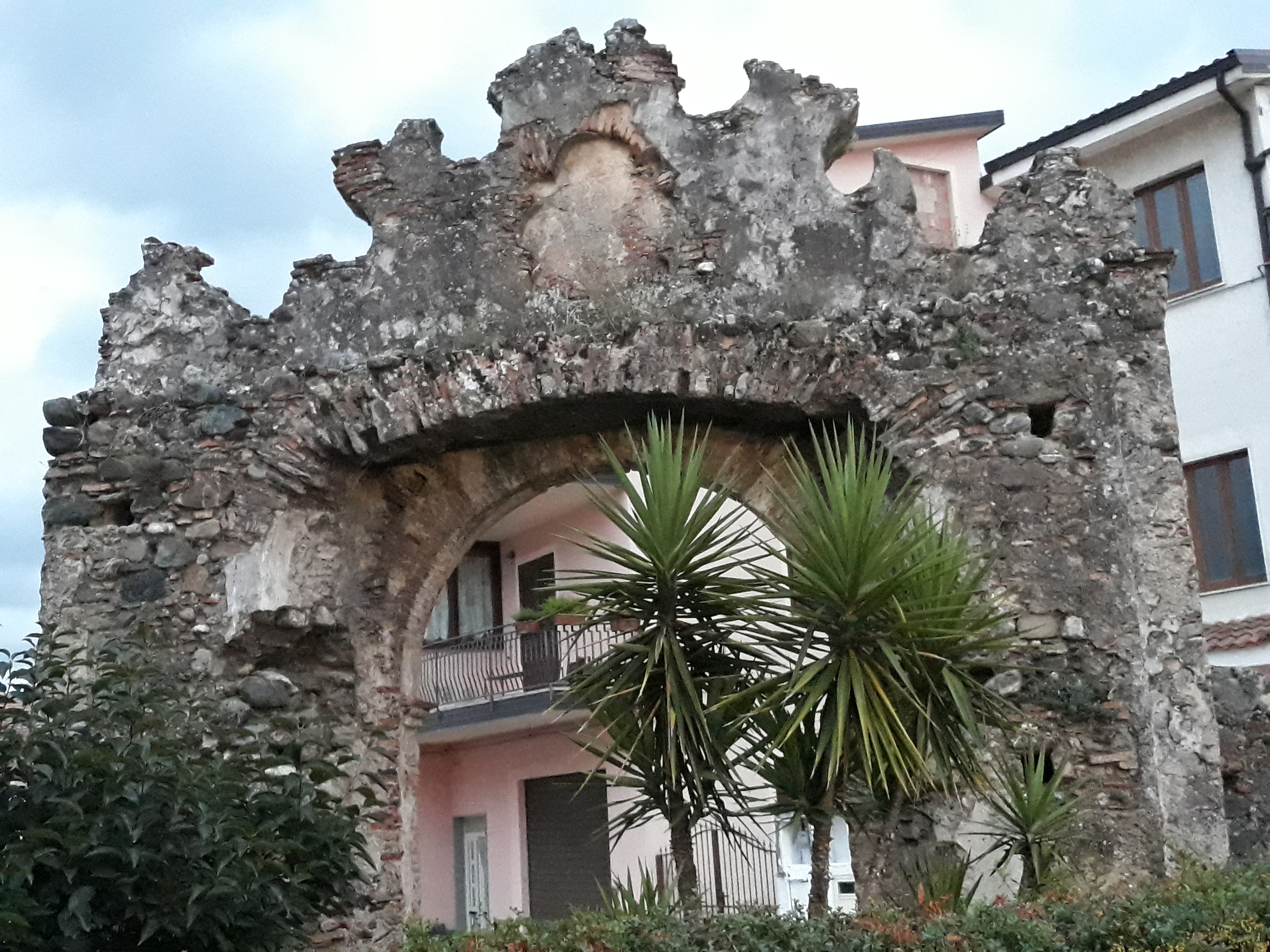 Porta di ingresso della Certosa di San Nicola This is a photo of a monument which is part of cultural heritage of Italy.